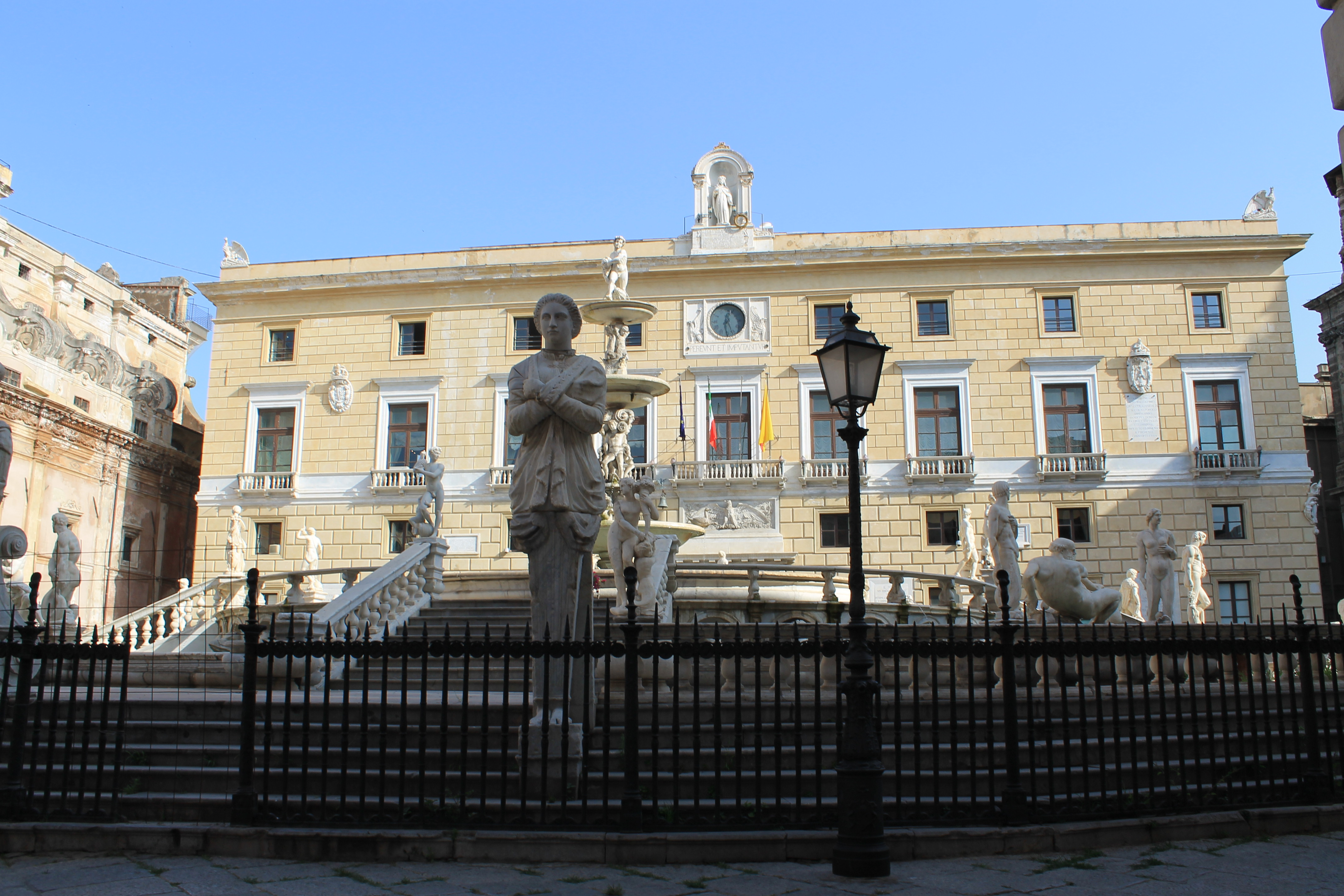 Palermo